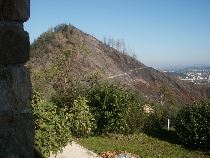 Un aperçu du "Crassier" d'Alès. Photo perso.